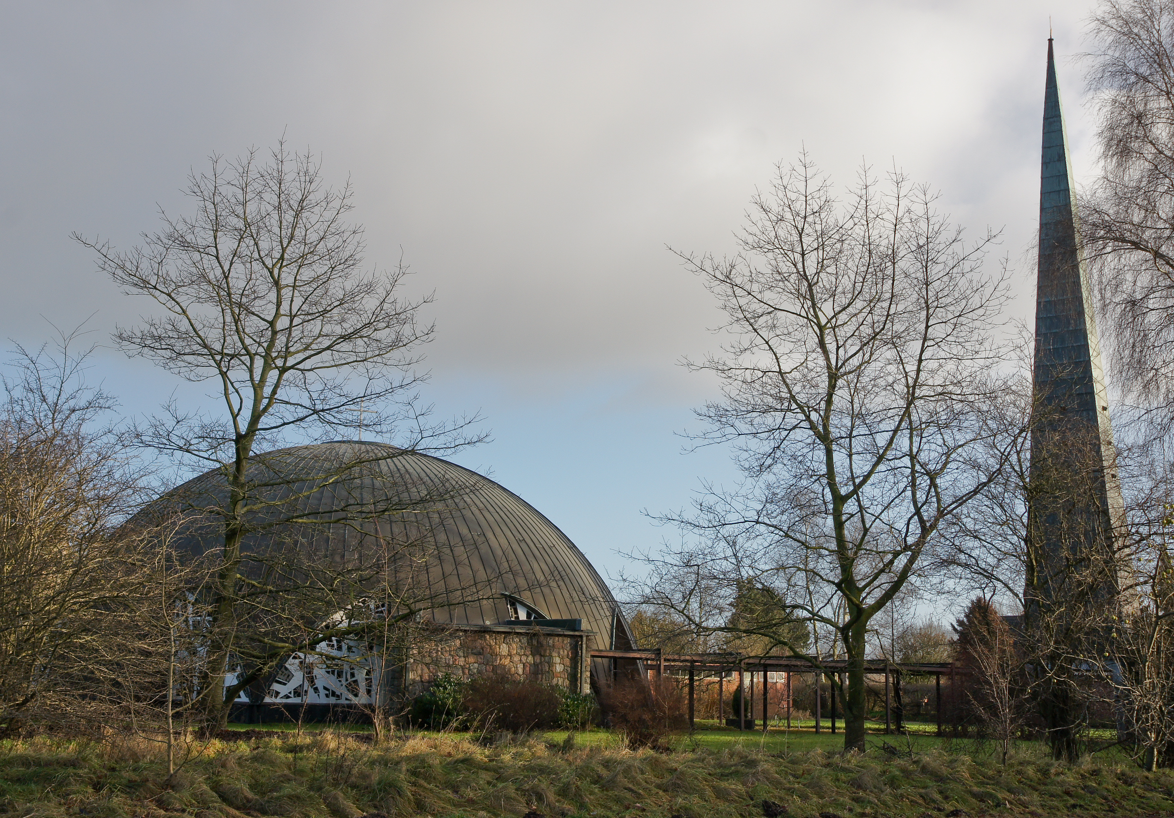 Katholische Kirche St. Michael in Flensburg-Weiche, Ochsenweg 82. Blick aus Nord-Westen. Errichtet 1964, 2004 profaniert, 2011 Nutzung ungeklärt.